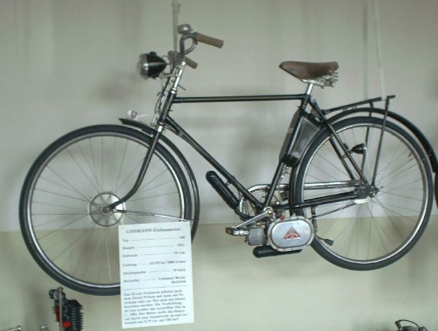 Fahrrad mit Lohman Anbaumotor, Motorradmuseum Ibbenbüren